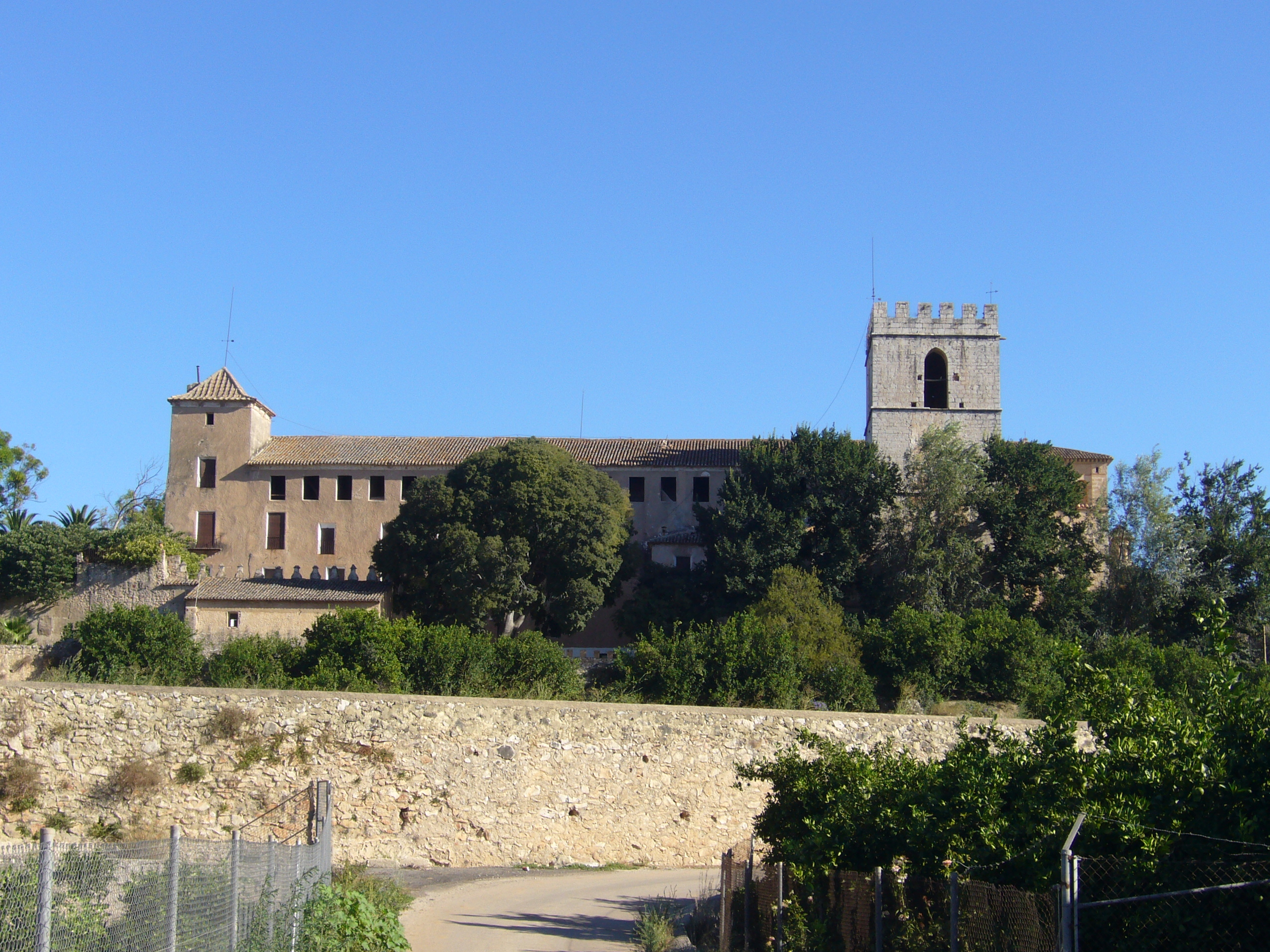 Monestir de Sant Jeroni de Cotalba. Vista general. La Safor, València (Espanya)